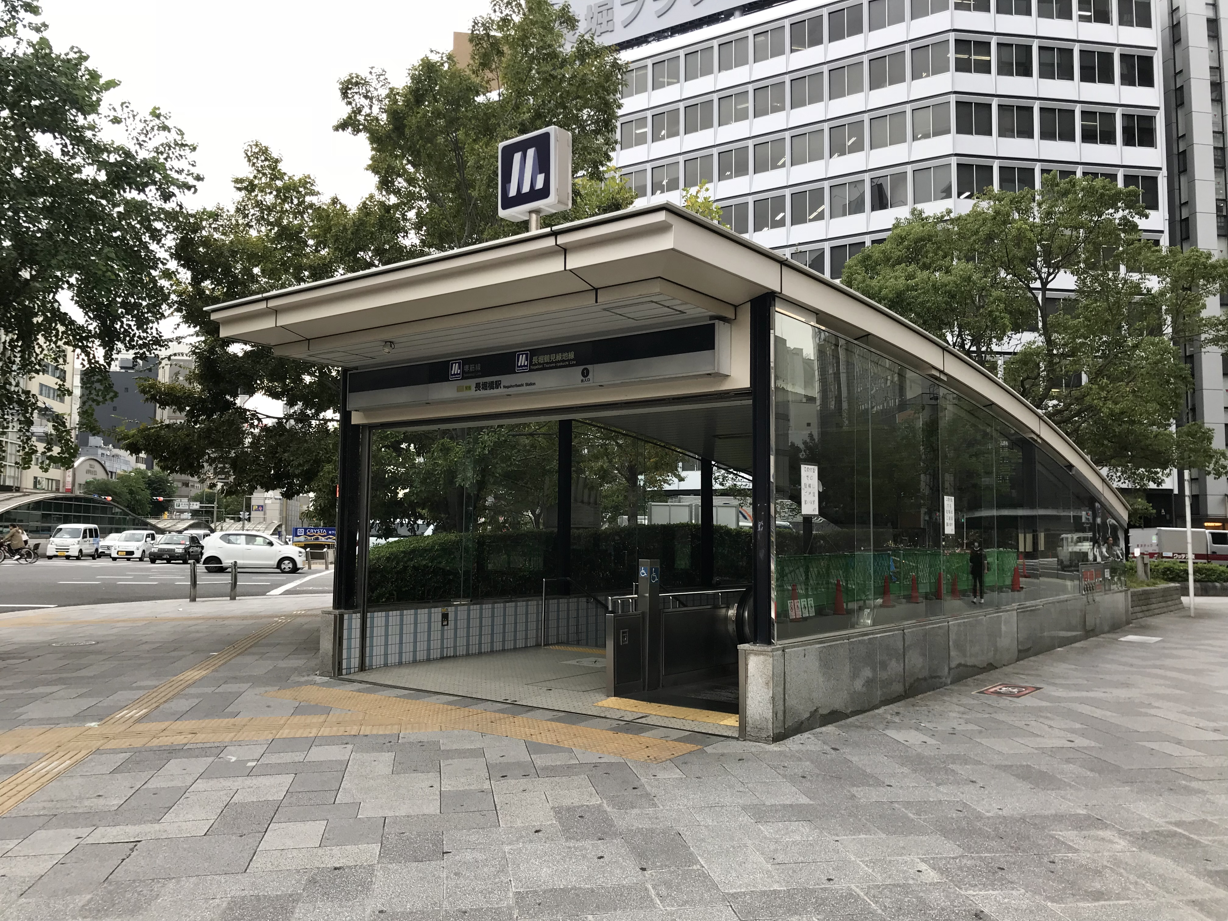 Osaka Metro堺筋線・長堀鶴見緑地線長堀橋駅1号出入口